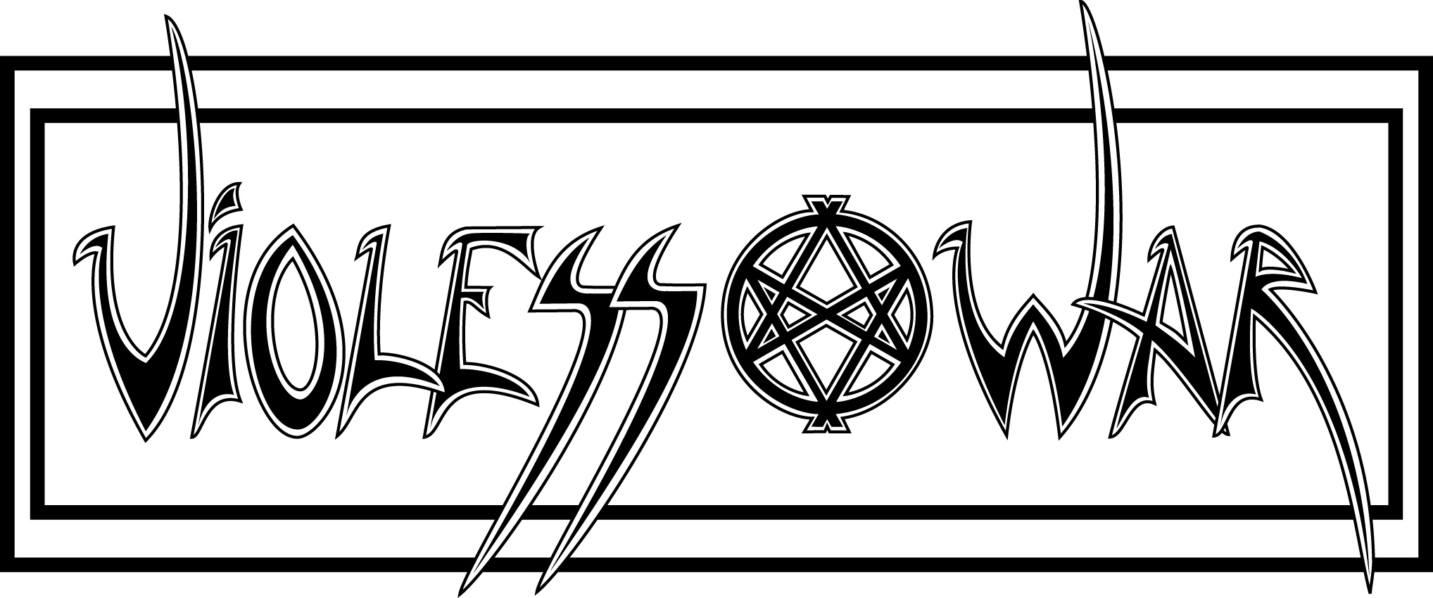 Logo des Kleinverlages Violess War